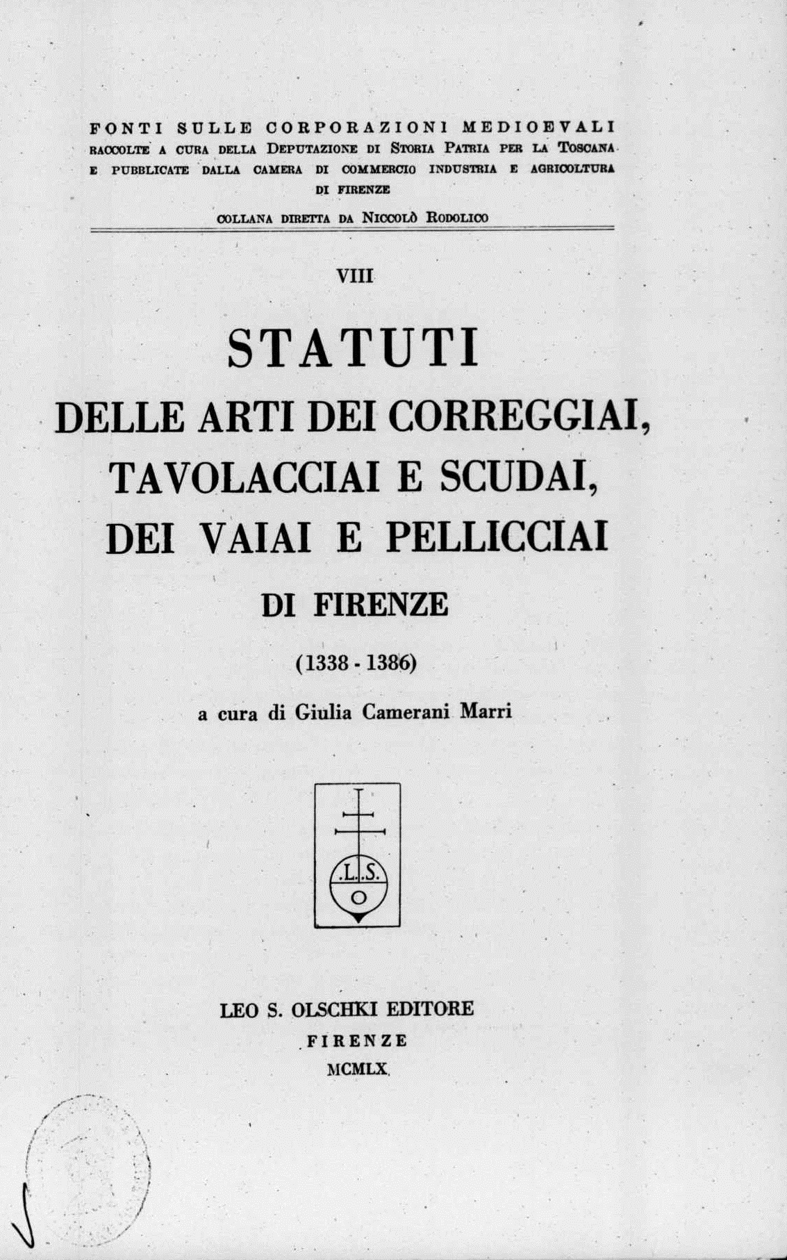 Frontespizio